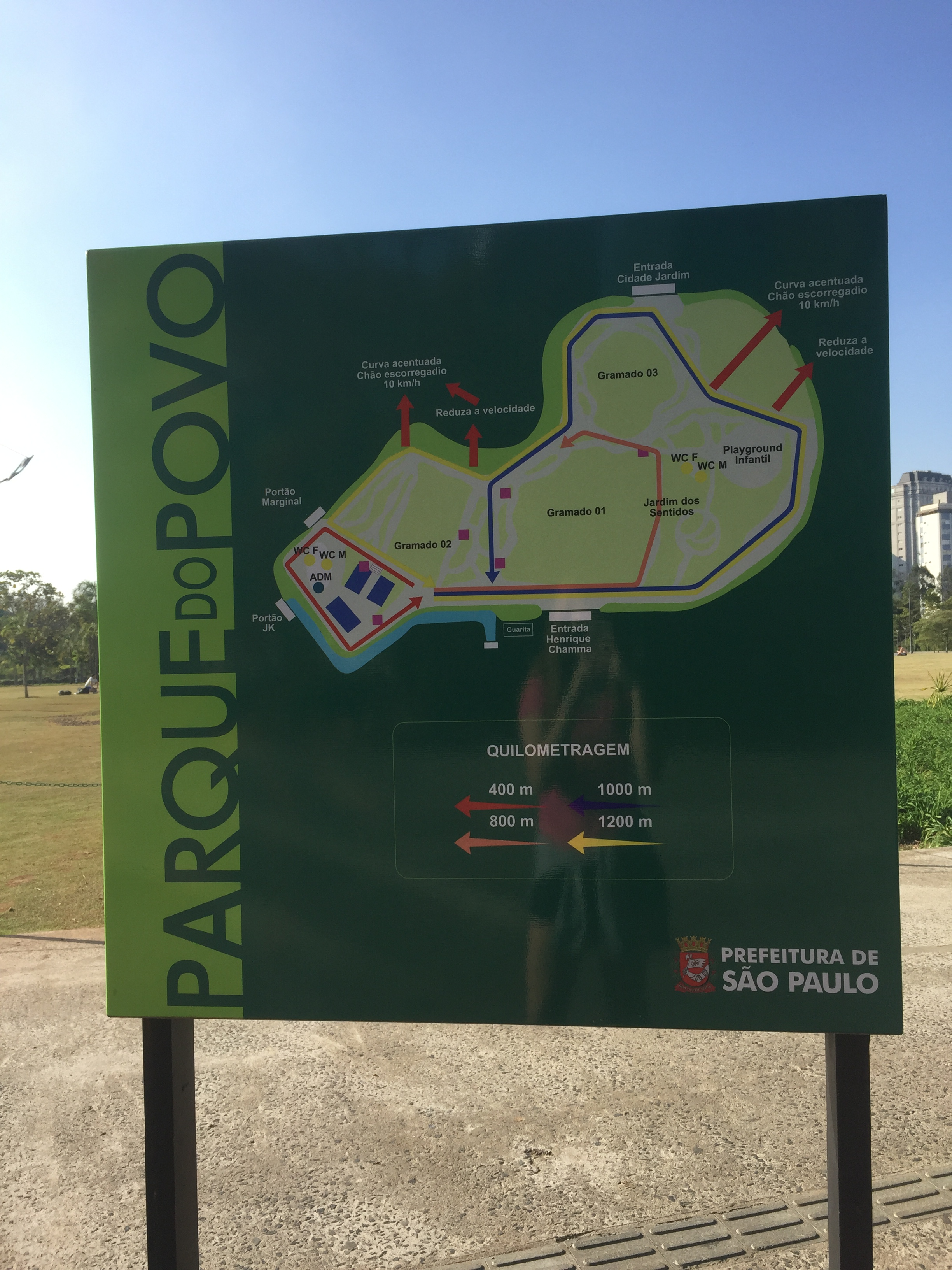 Mapa Parque do Povo